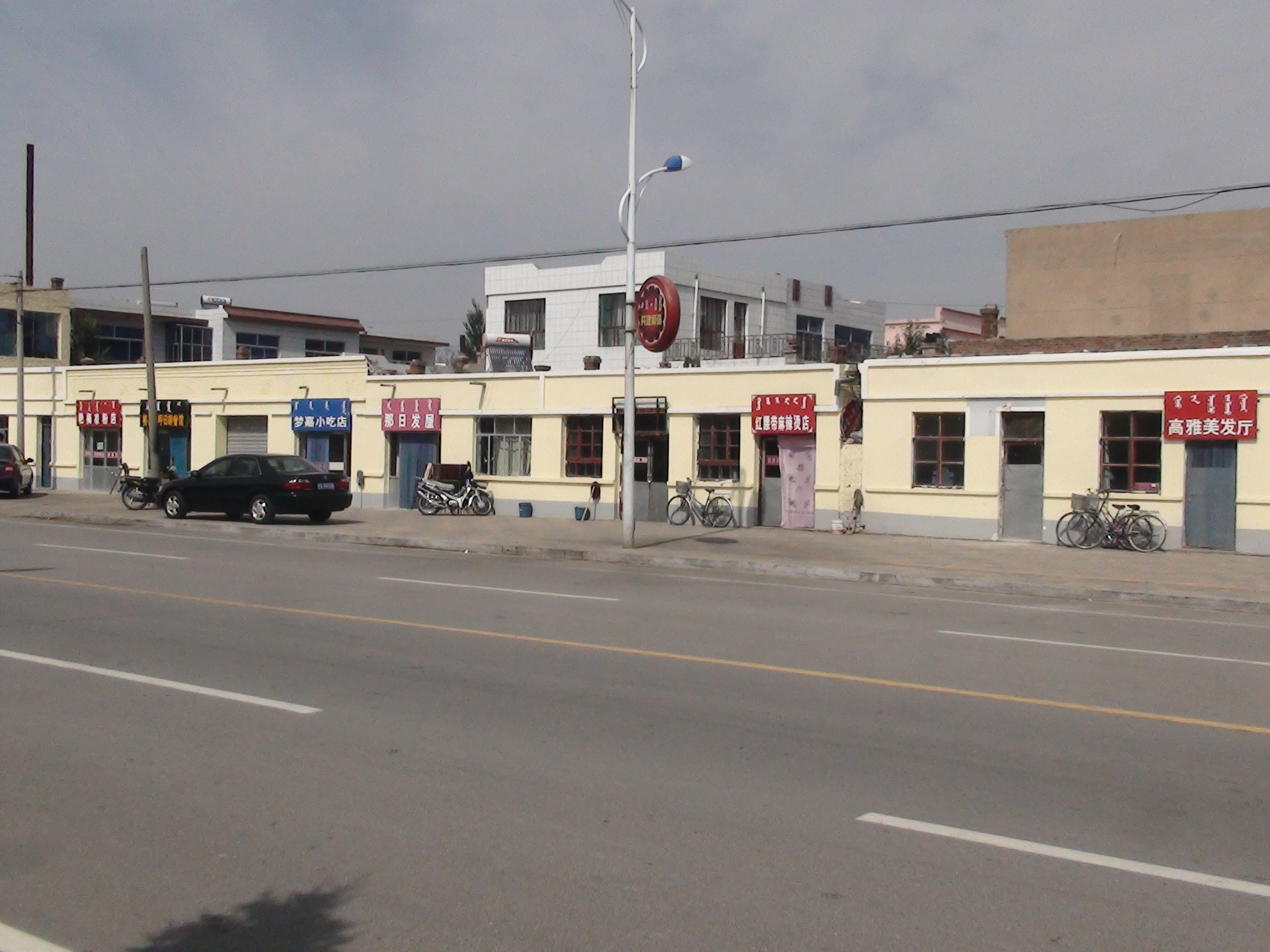 鄂托克旗乌兰镇街道